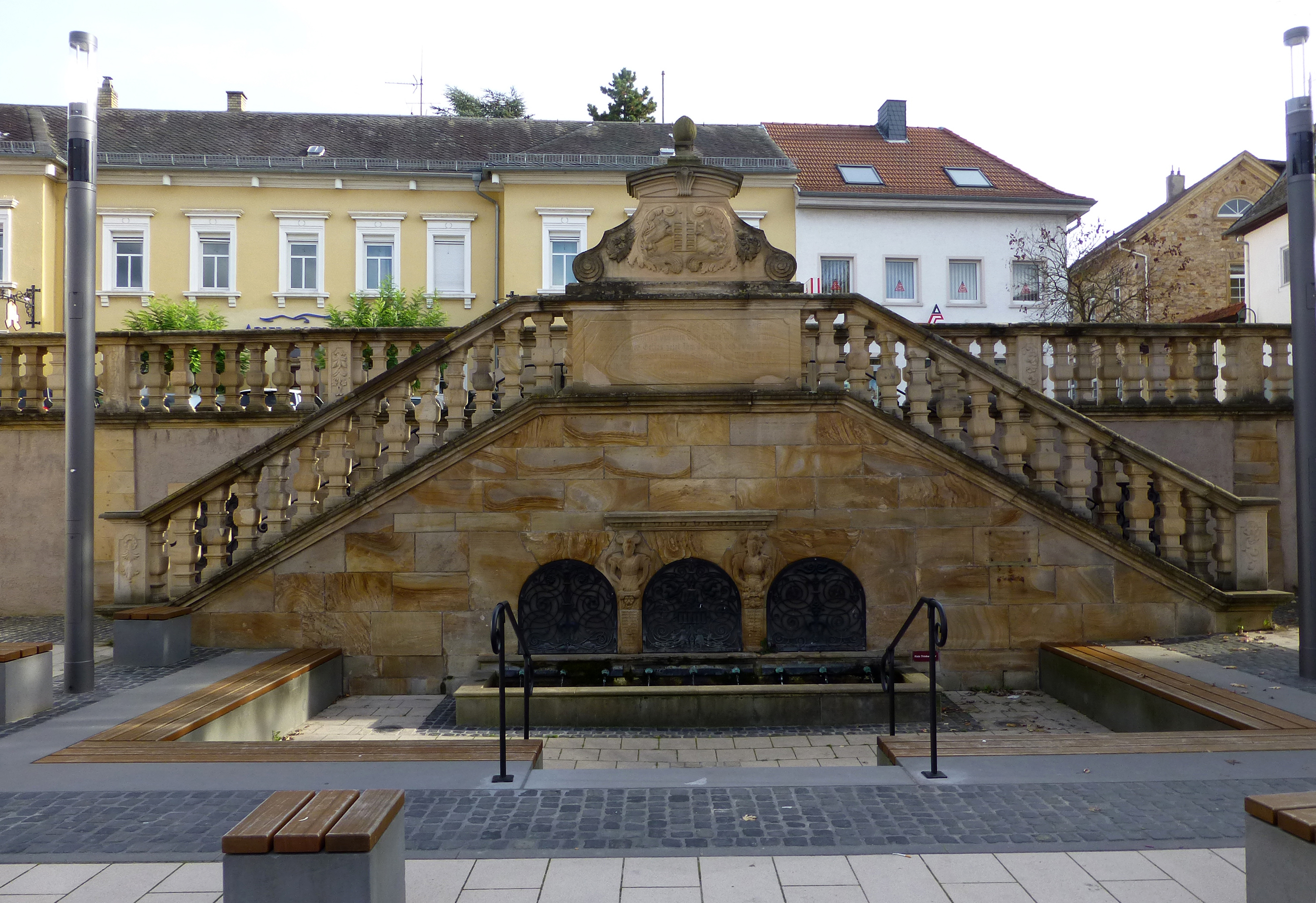 Fontaine à 9 bouches à Wörrstadt, district Alzey-Worms.